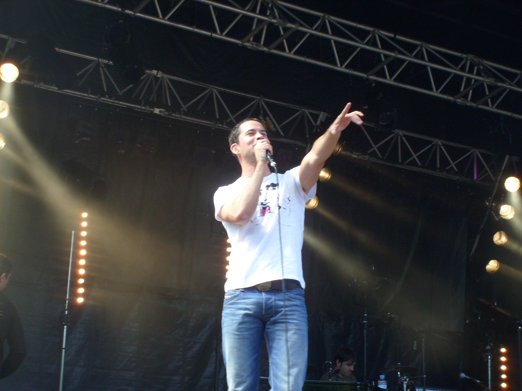 Emmanuel Moire en concert à Dunkerque